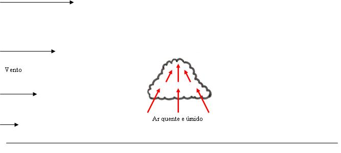 Fase Inicial Cumulonimbus